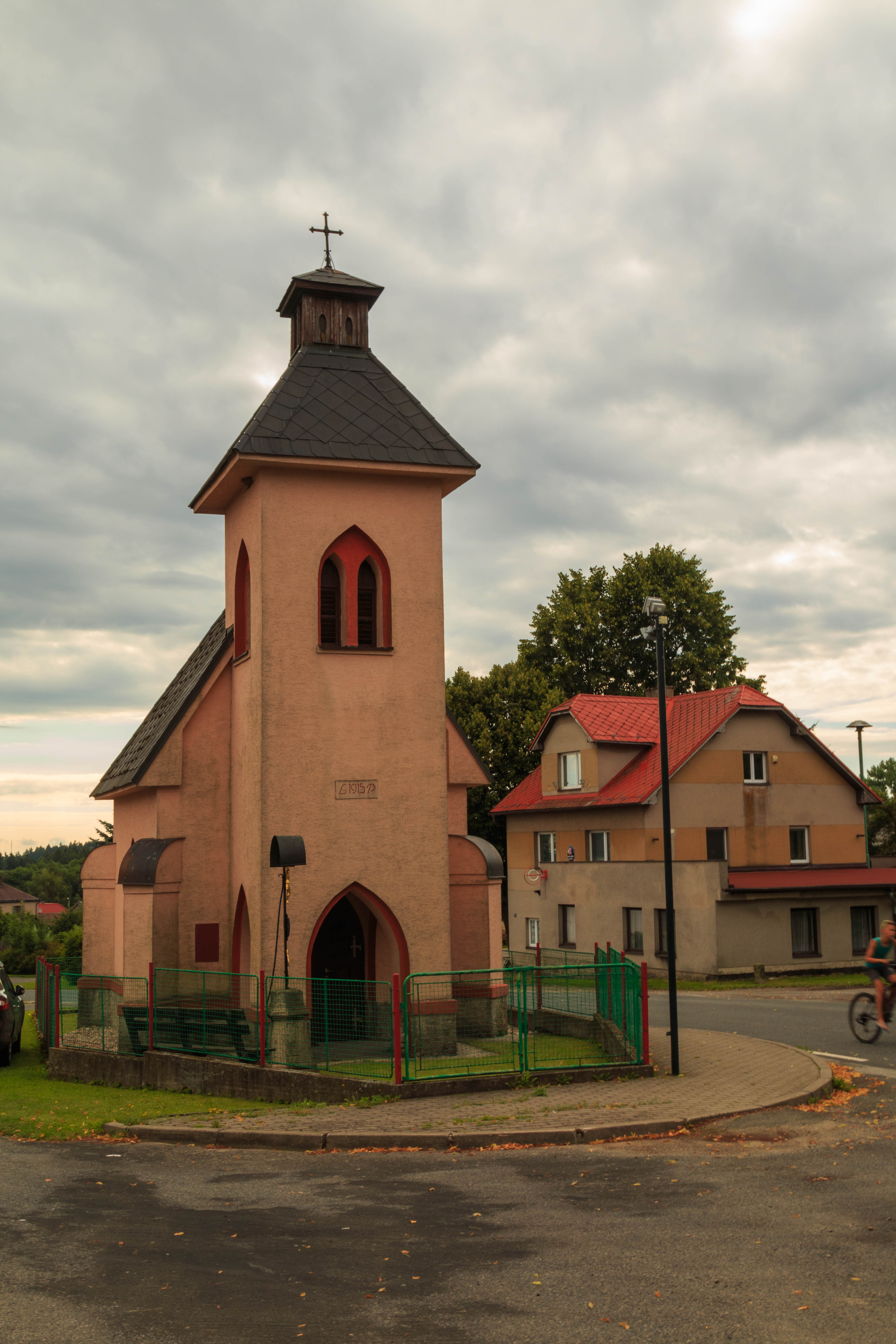 Sedletínská kaple